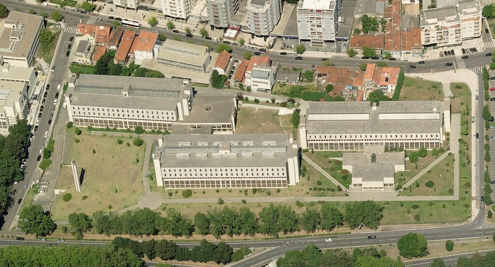 Vista Geral sobre os jardins de Química e Matemática.